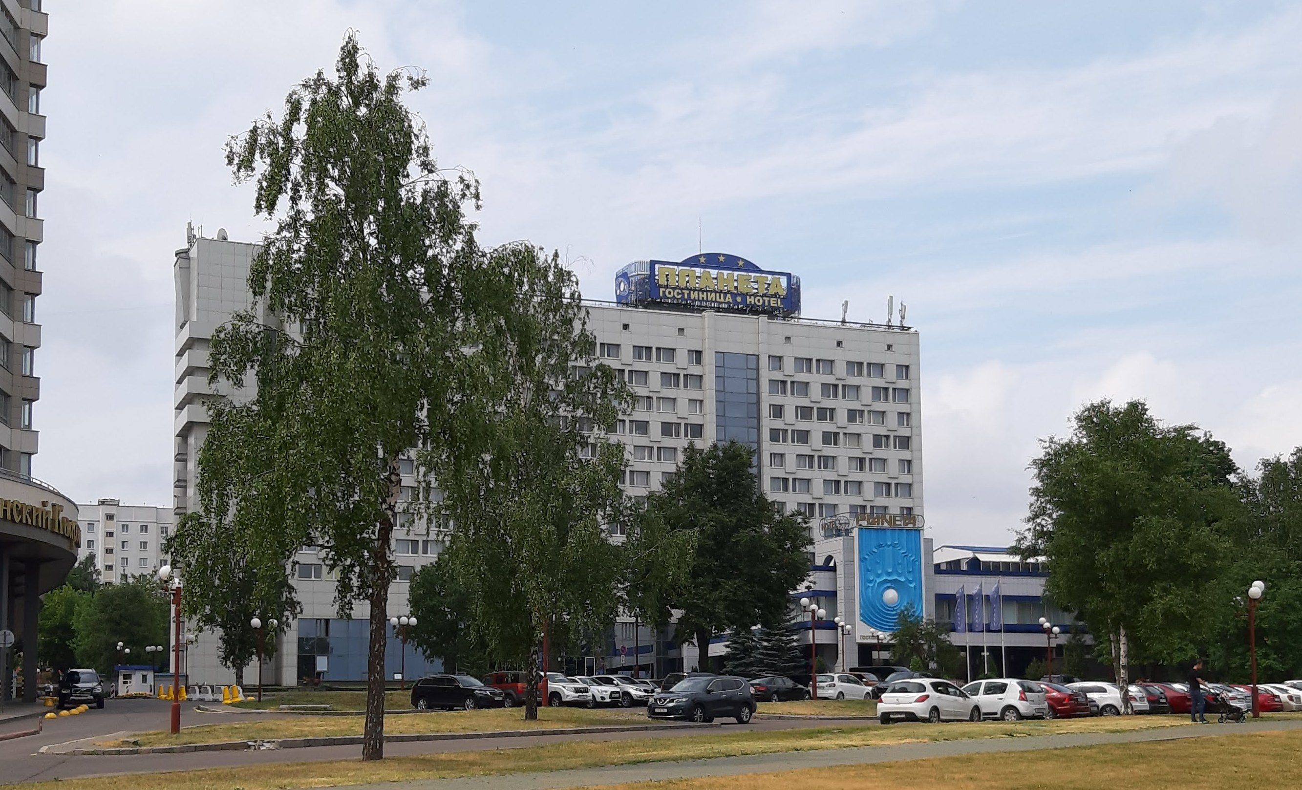 Мінск. Праспект Пераможцаў ля стэлы